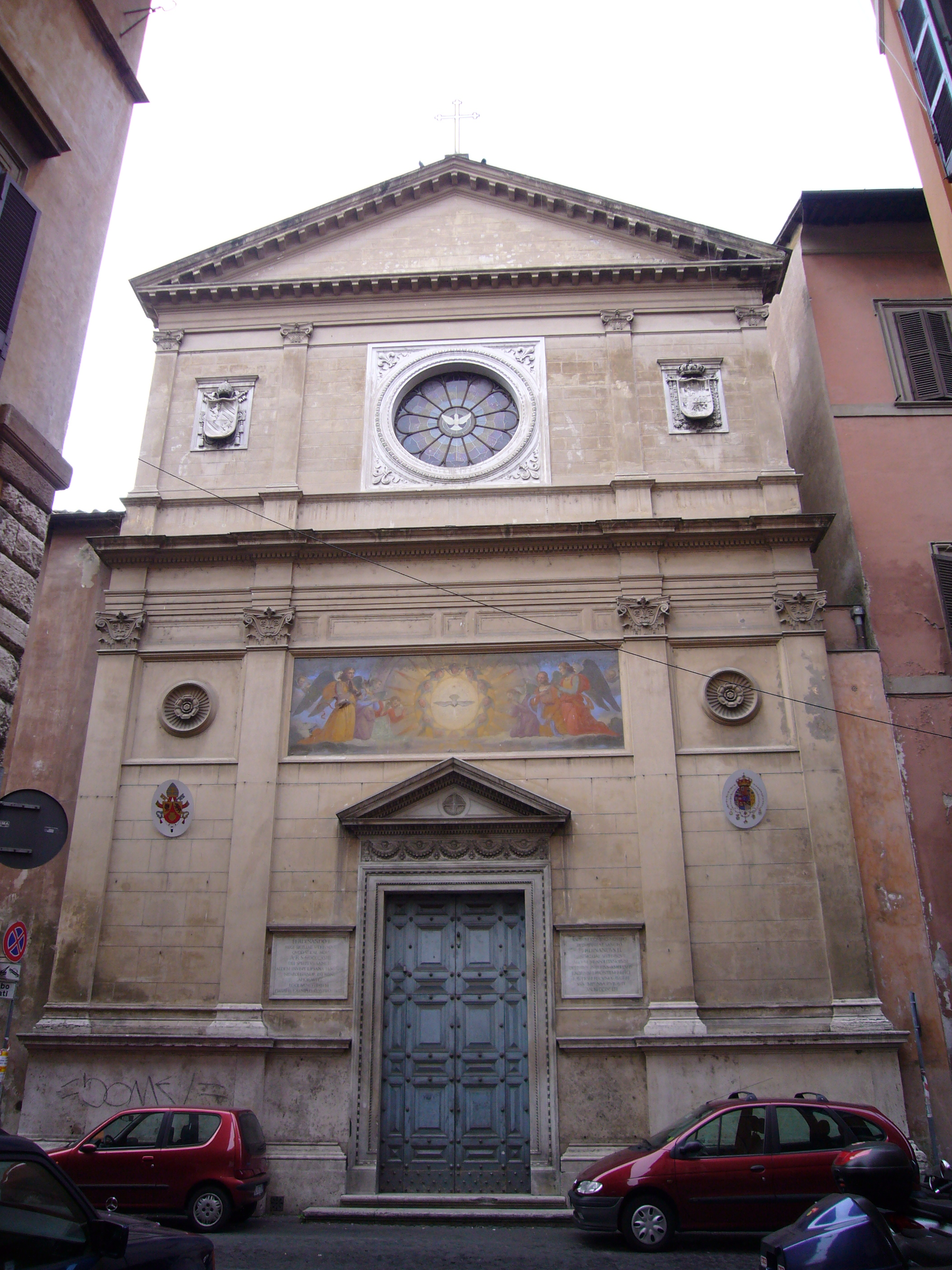 Roma, via Giulia: chiesa del Santo Spirito dei Napoletani (già Santa Aurea)